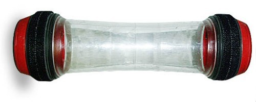 Rohrposthülse